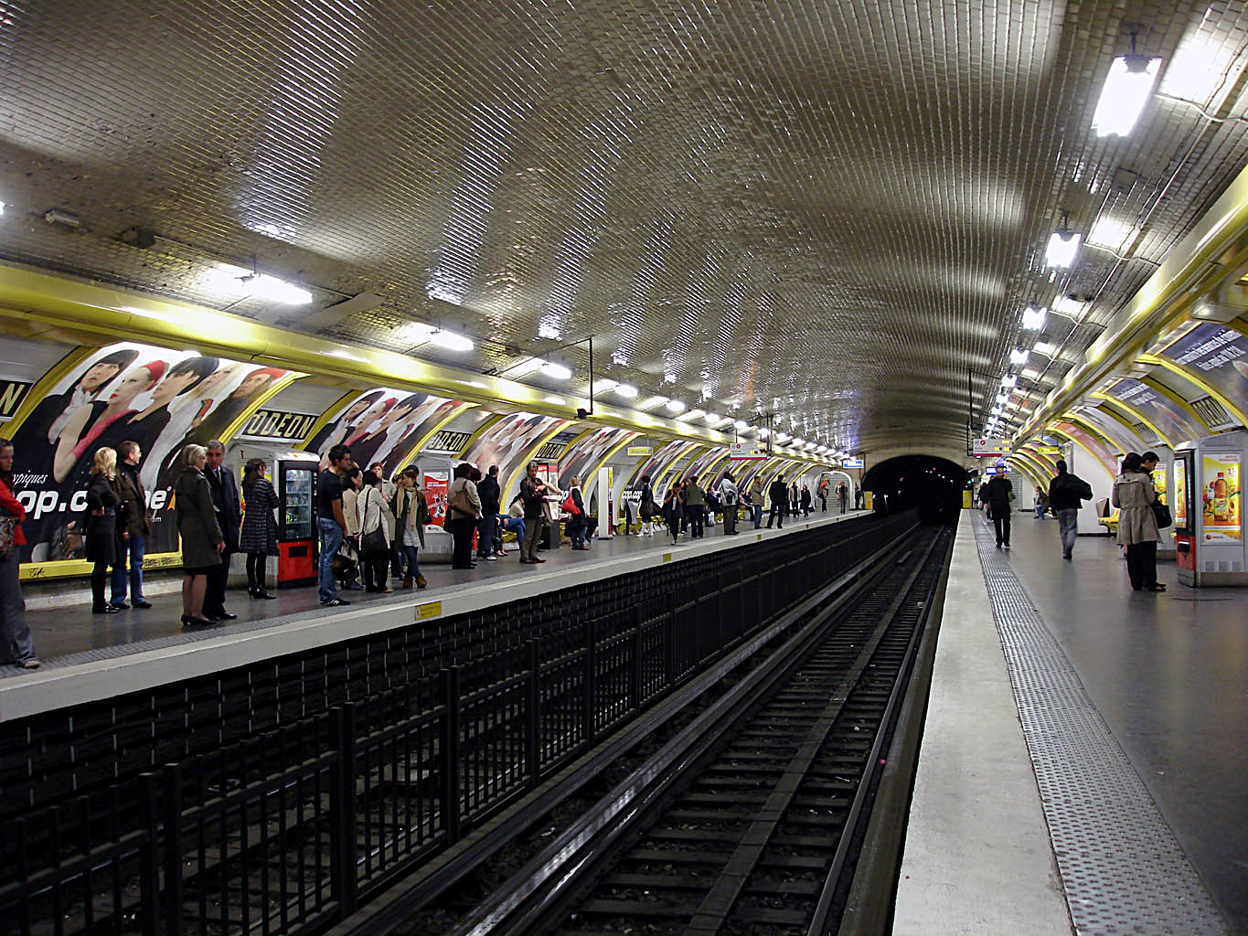 Station Odéon, de la ligne 4 du métro de Paris, France.